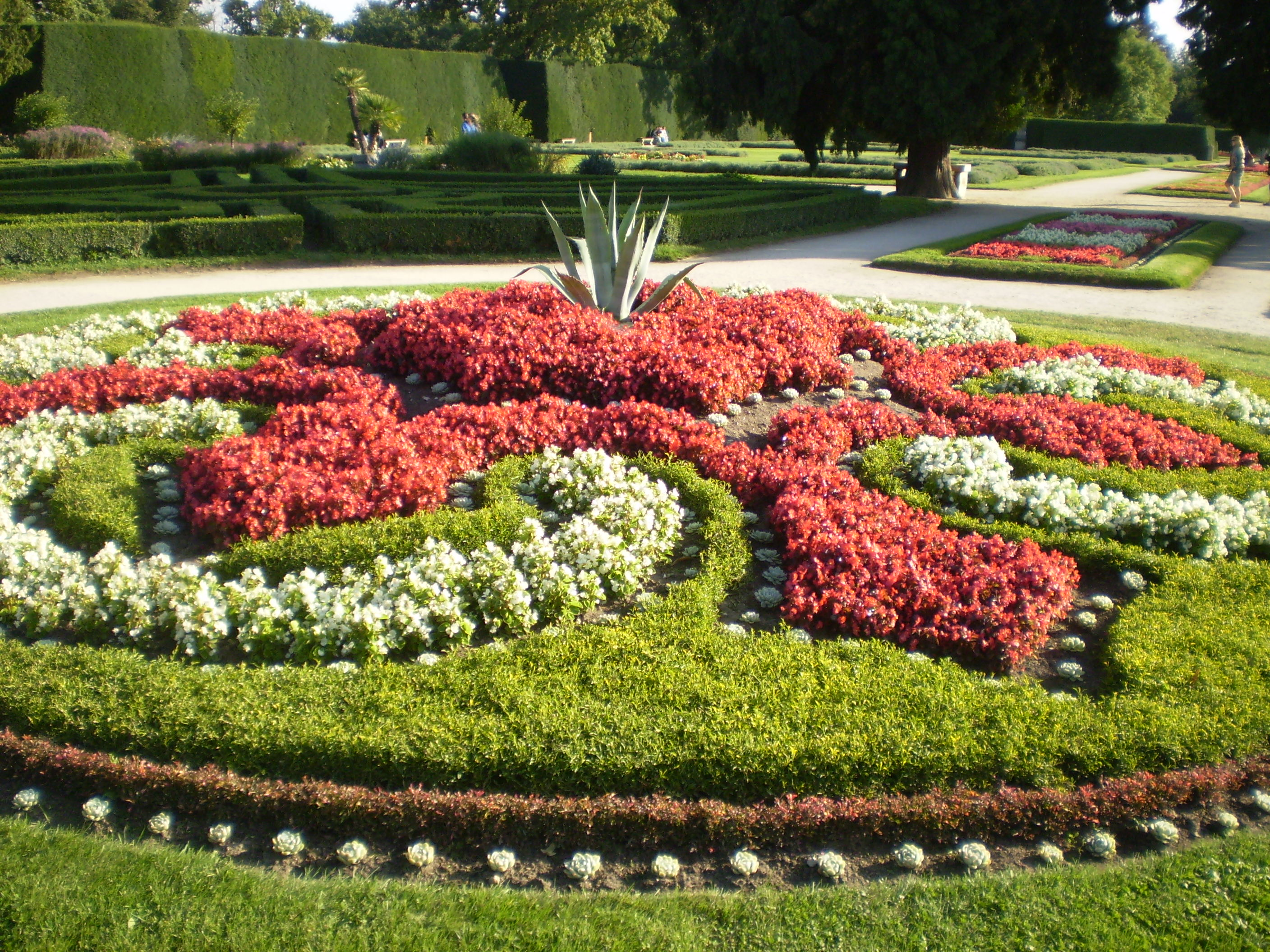 Areál zámku lednice.